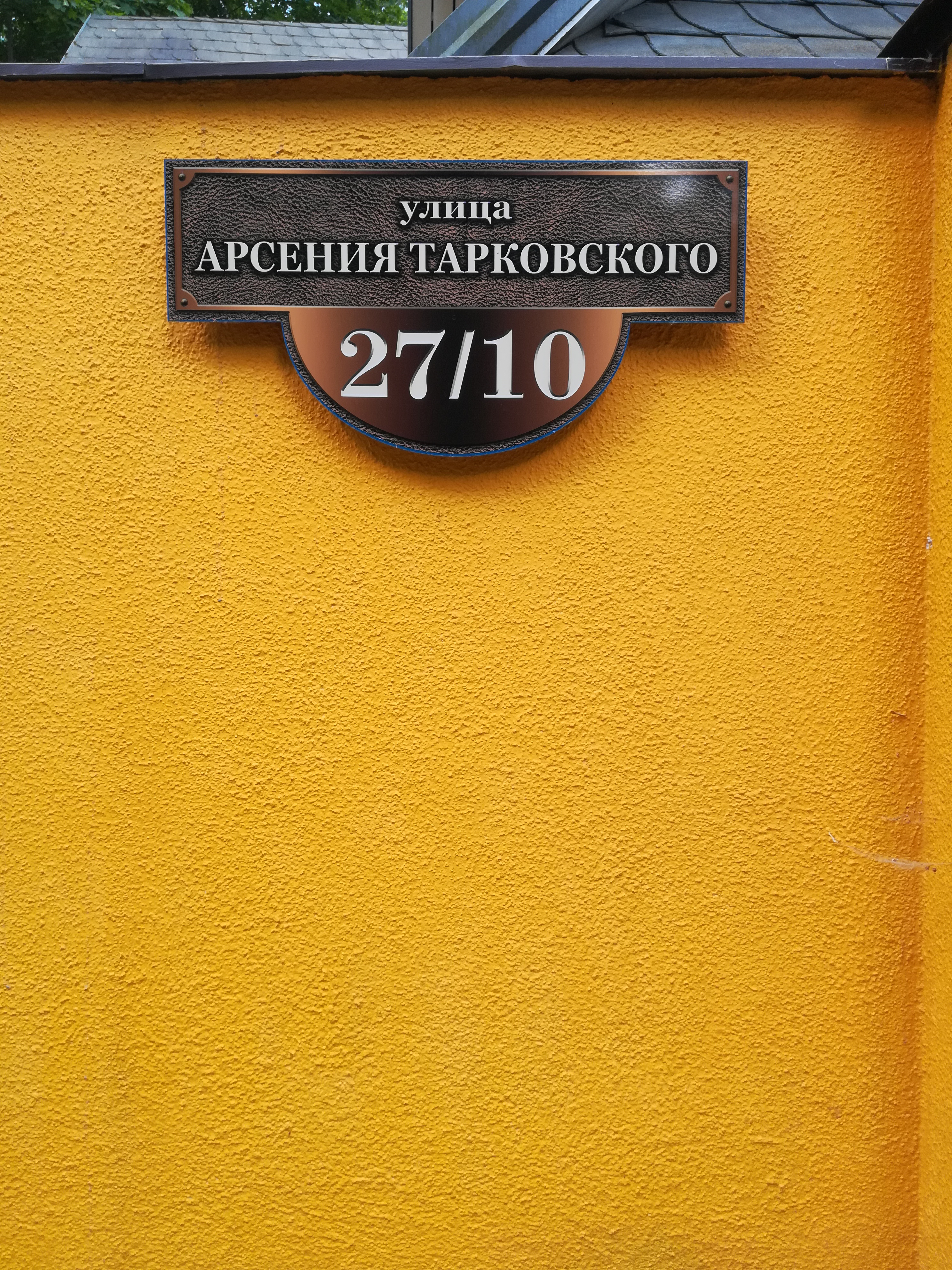 Переделкино